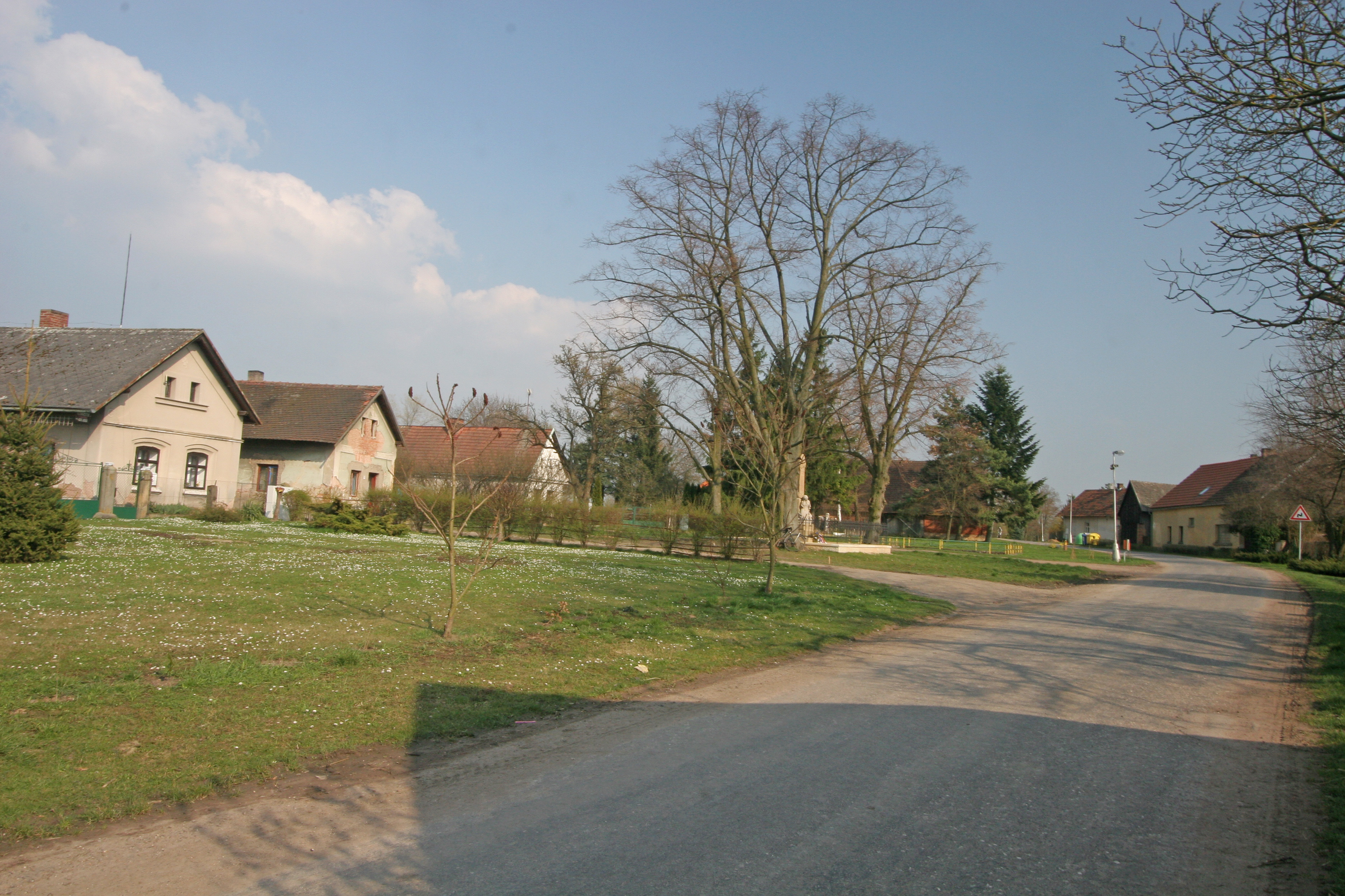 Sylvárův Újezd náves